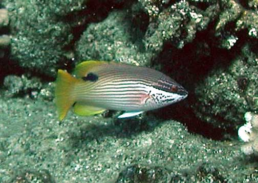 Bodianus albotaeniatus